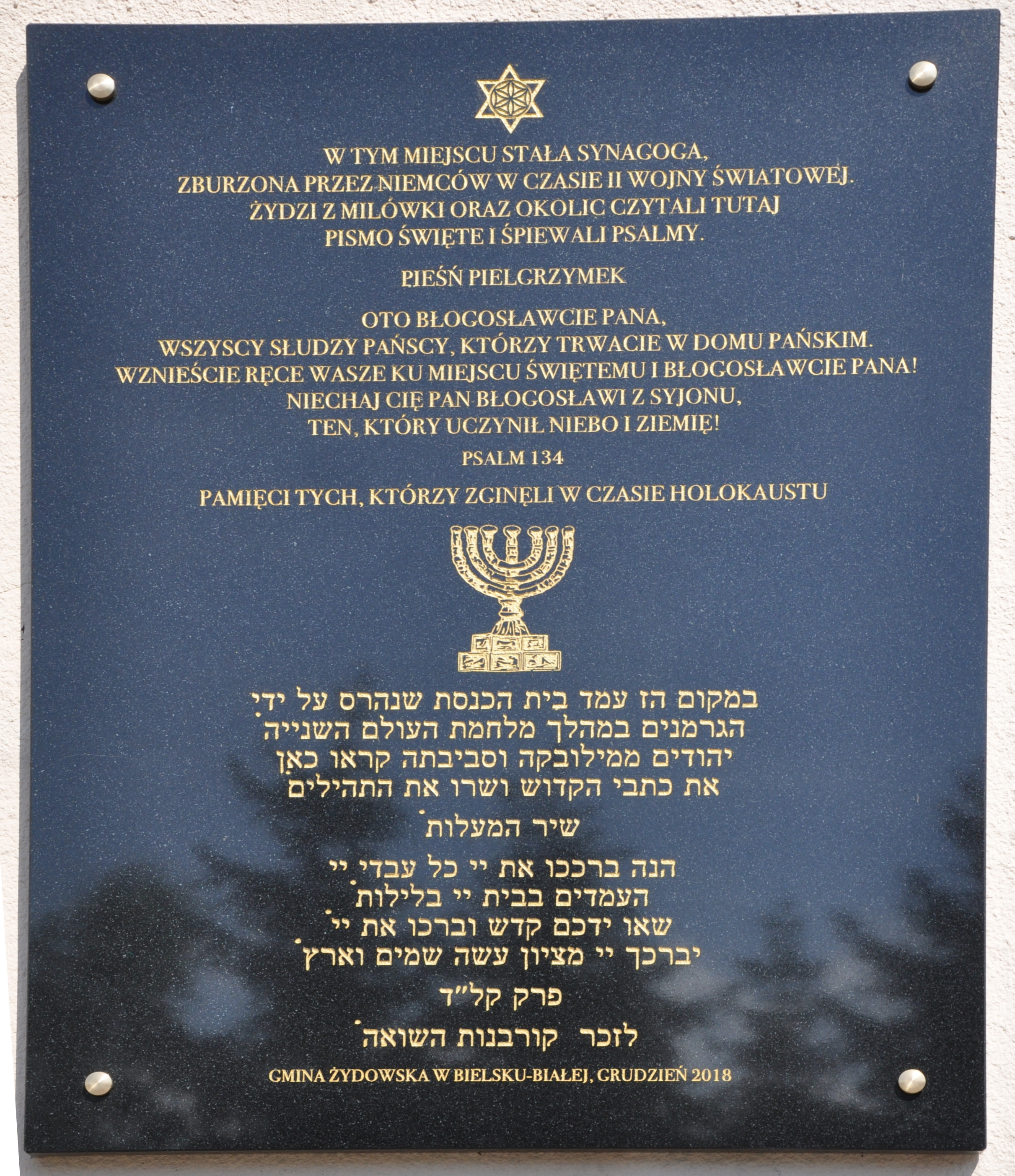 Milówka tablica upamiętniająca synagogę